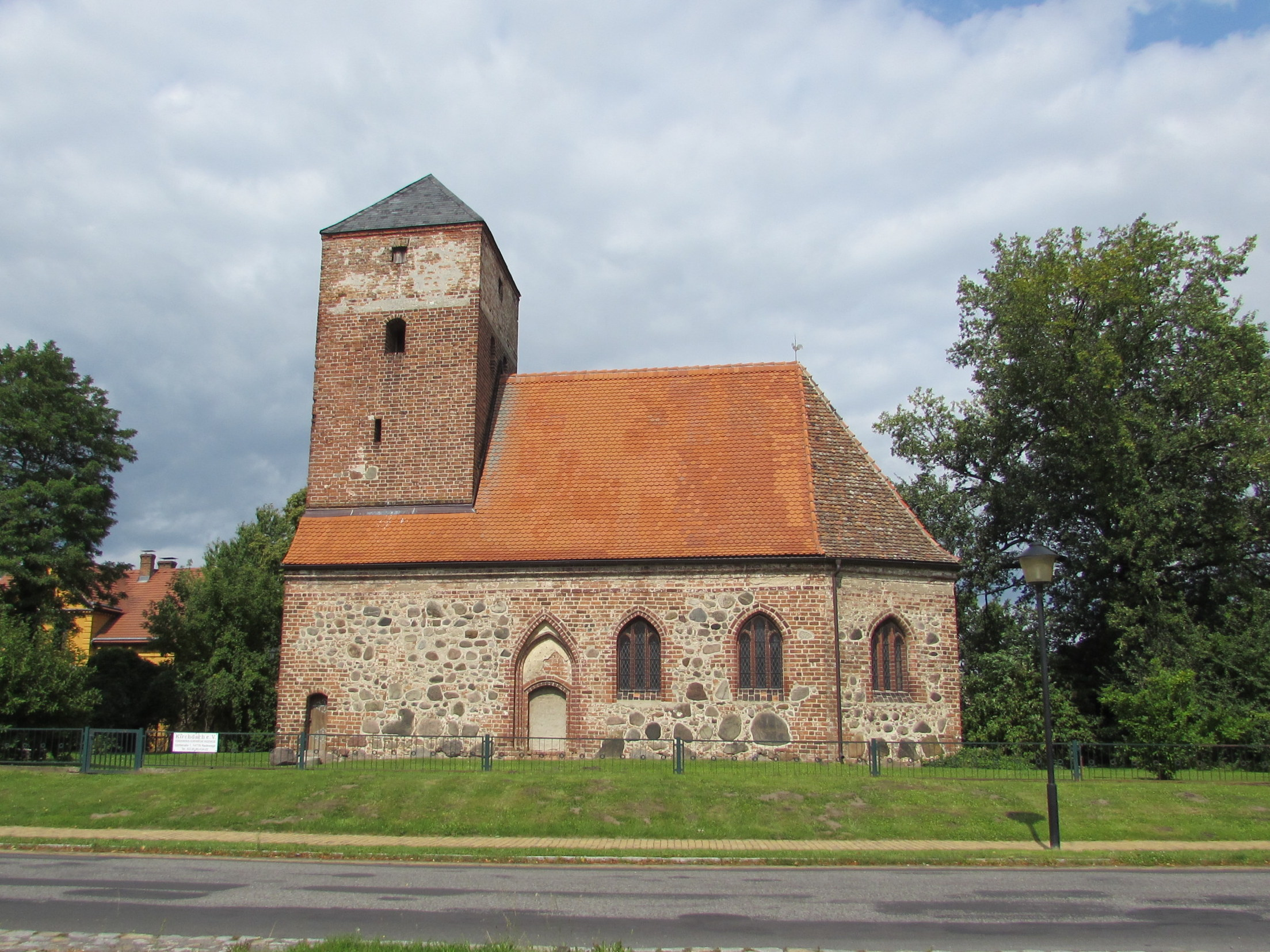 dorfkirche radwege